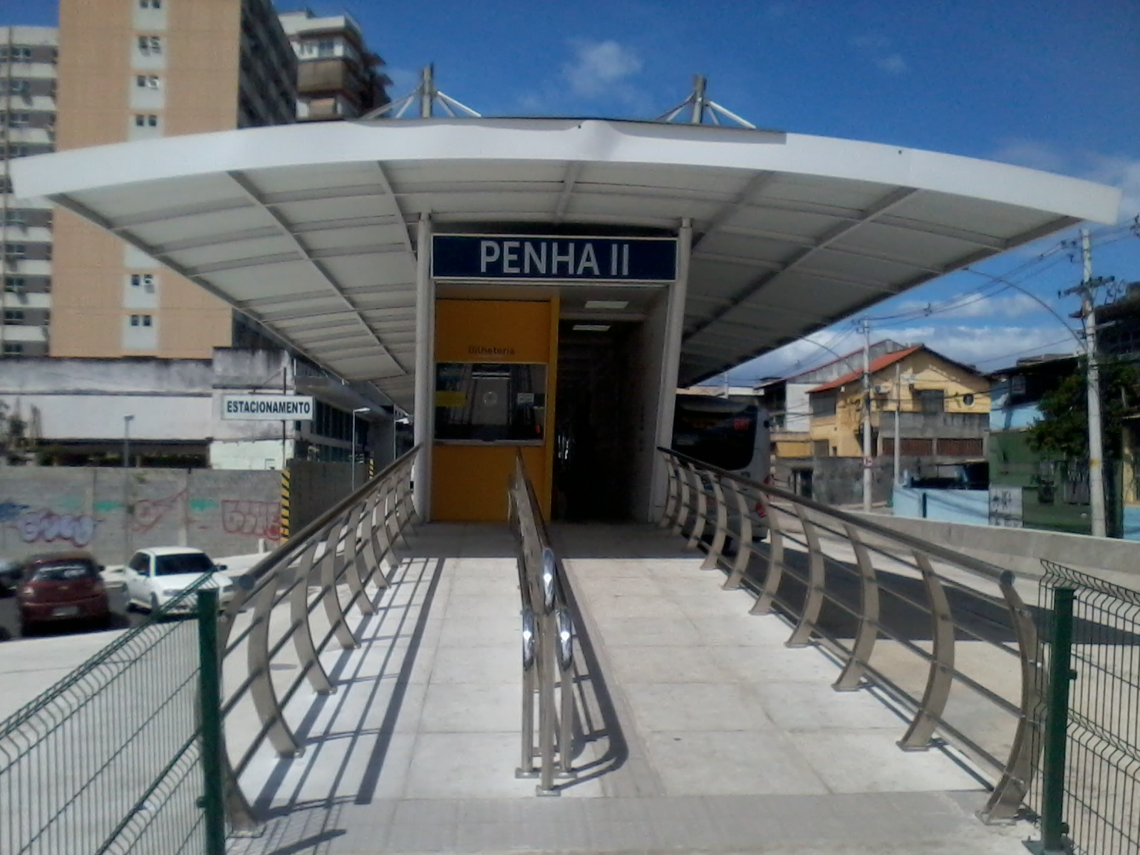 Entrada da Estação Penha 2 próximo ao Parque Shanghai